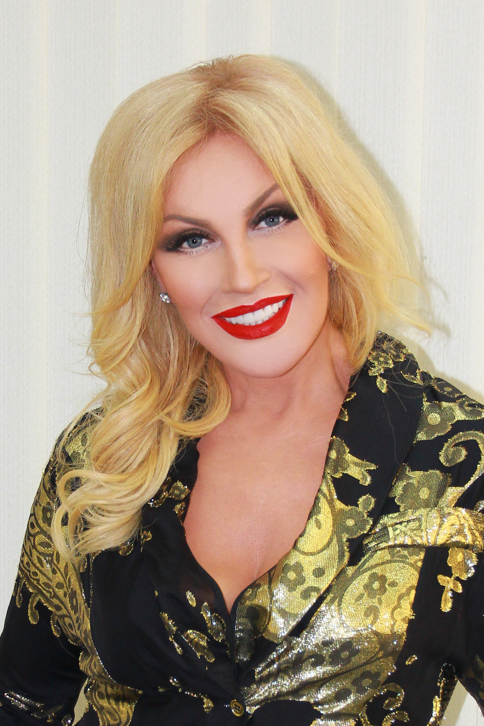 Съемки Голубого огонька, 2016